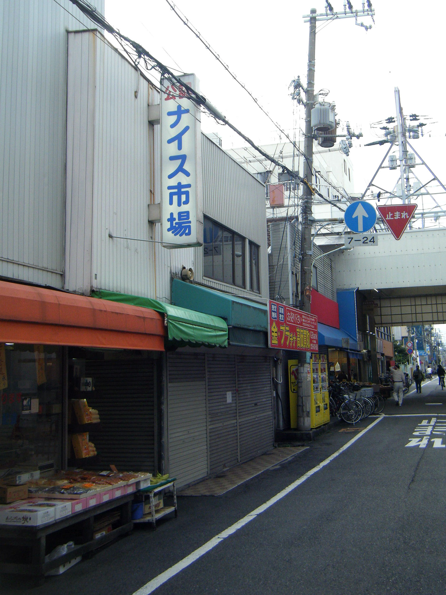 ナイス市場 北入口